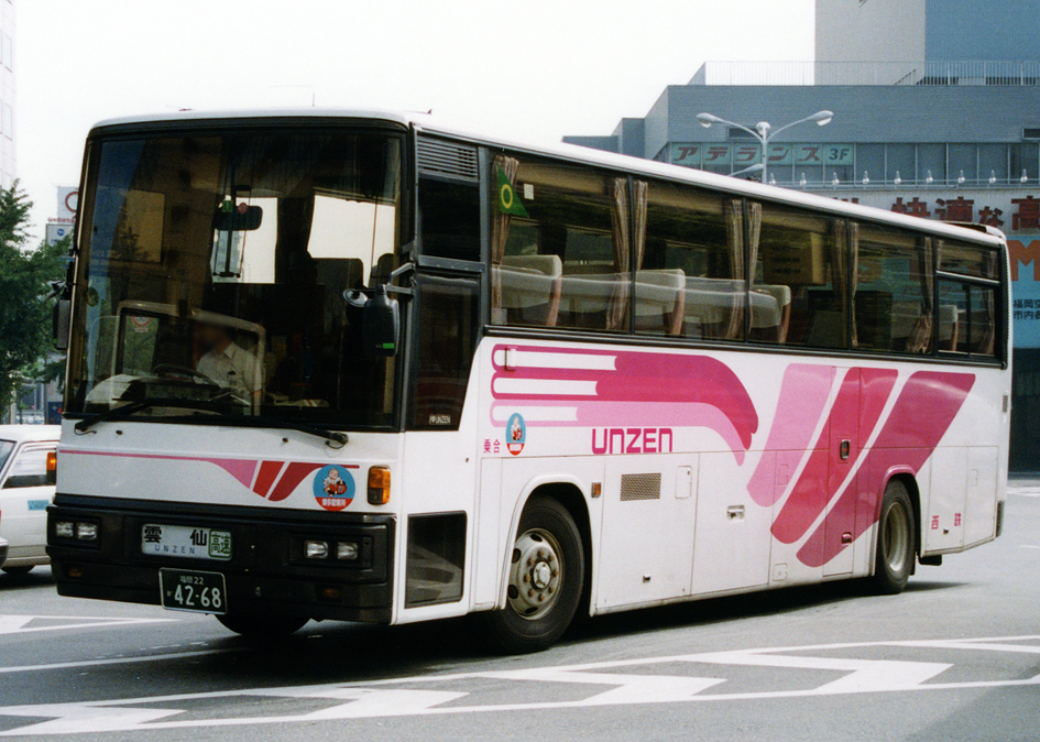 西日本鉄道 高速バス 雲仙号 三菱ふそう P-MS725S 西工SD-I 4456